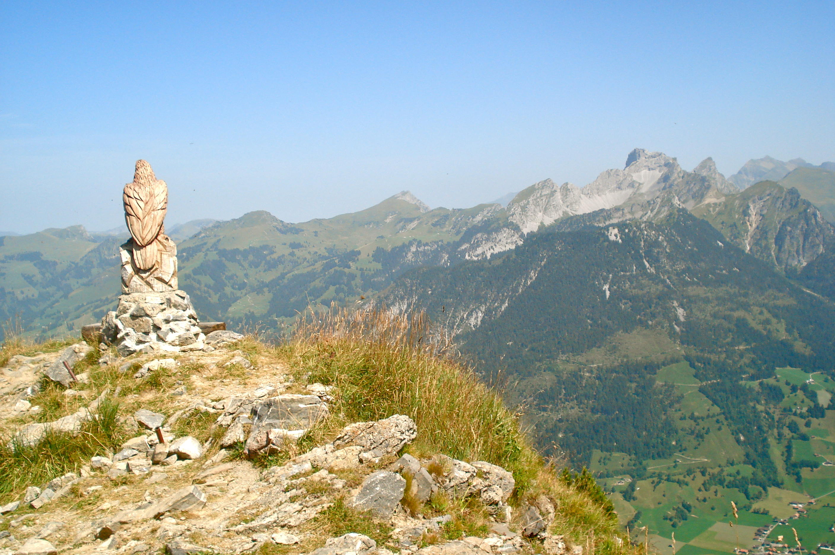 Auf dem Rinderberg, Bern